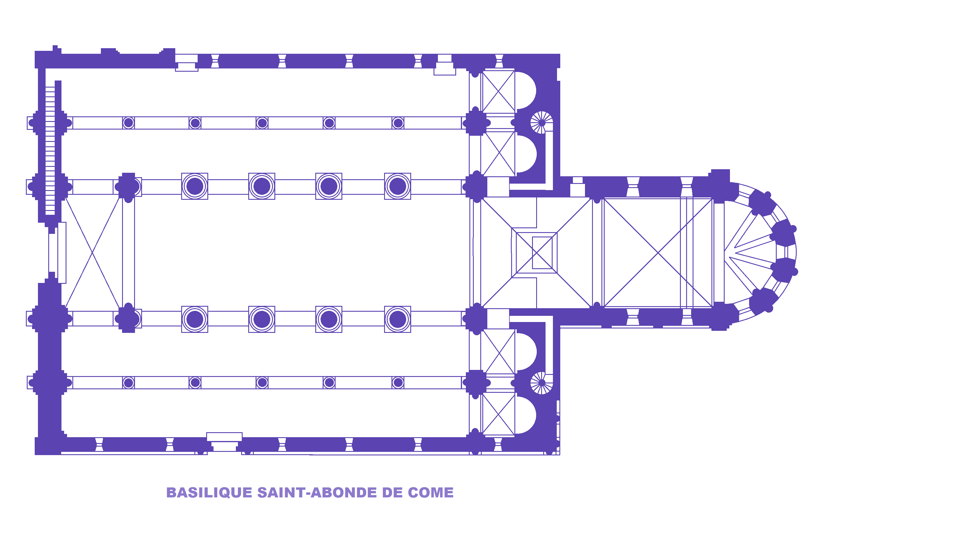 Basilique de Côme, Plan